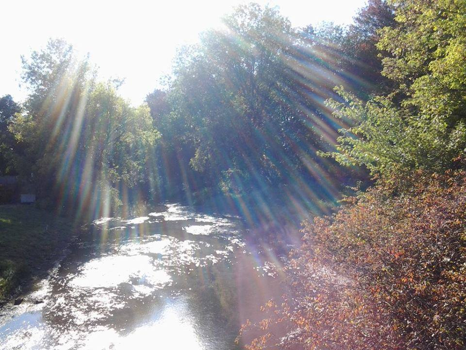 Rivière Mattabesset à Berlin, Connecticut (USA), regardant en amont. Prise en Octobre 2013